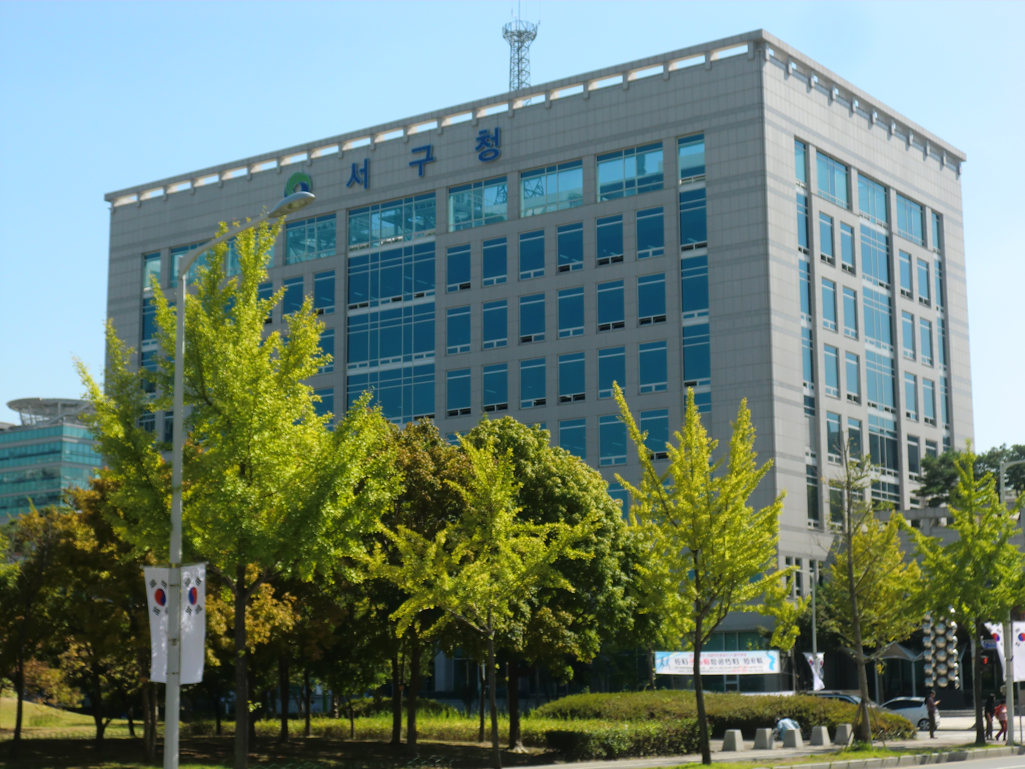 대전광역시 서구에 있는 서구청